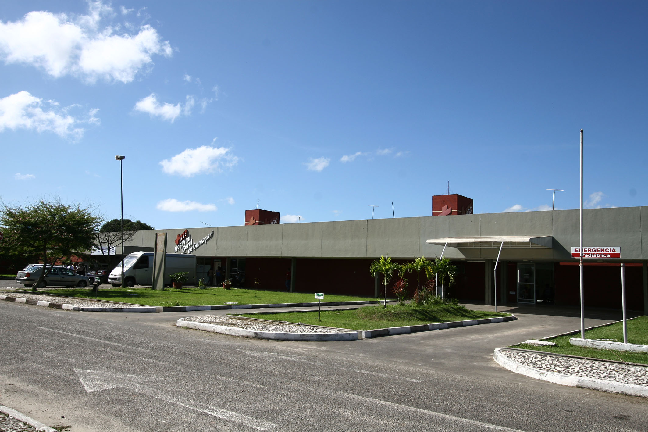 Inauguração do Sistema de Gás Natural do Hospital Geral de Camaçari. Foto: Carol Garcia / SECOM